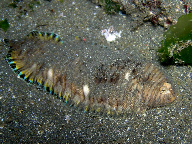 セトウシノシタ Pseudaesopia japonica